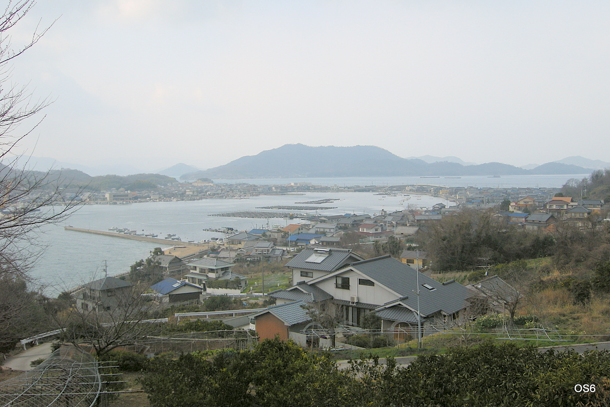 福山市内海町。手前が田島で向こう側が横島。